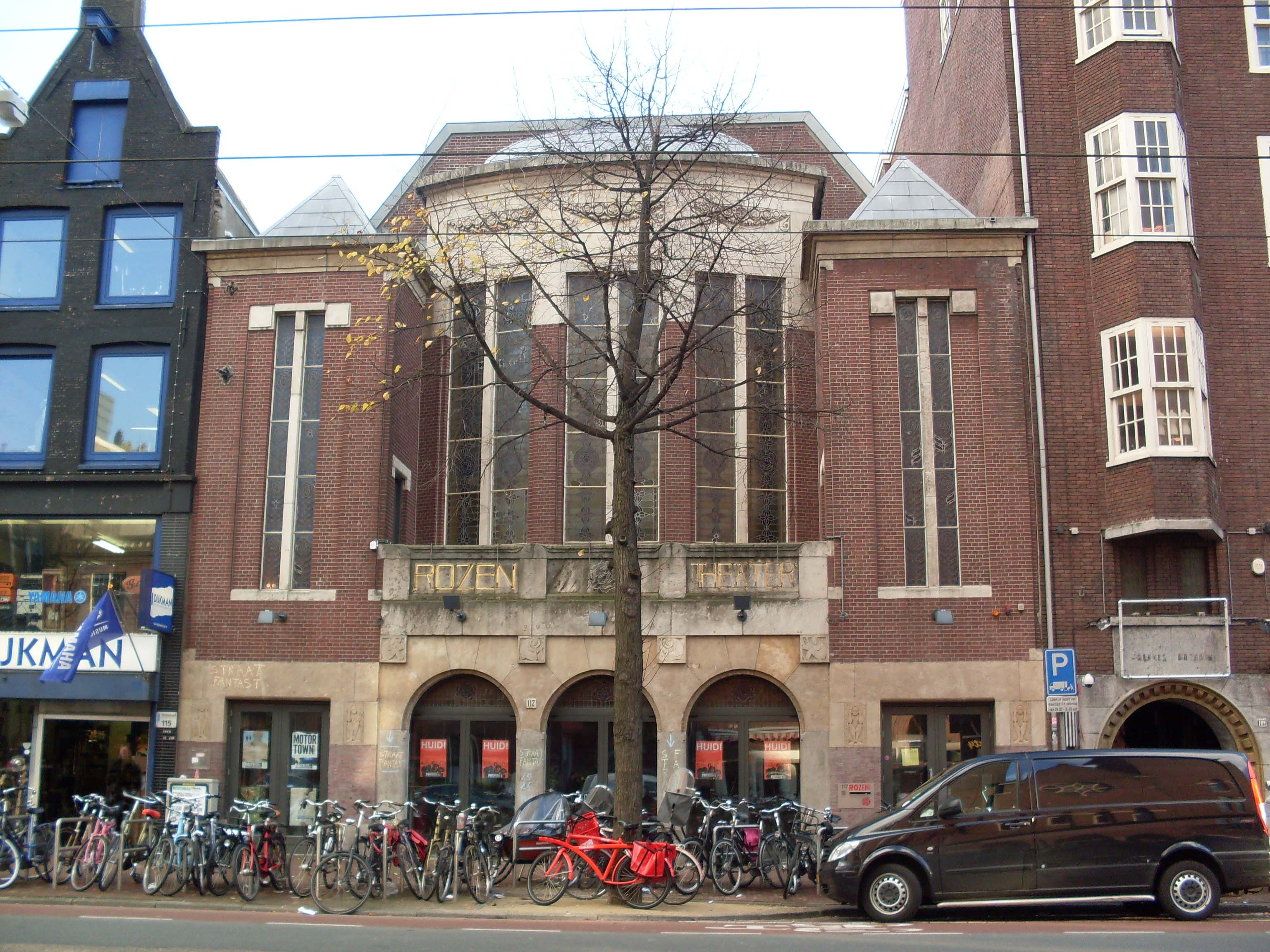 Rozentheater, Rozengracht 117, Amsterdam.